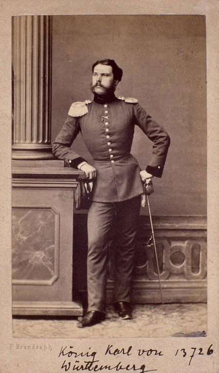 König Karl von Württemberg, Fotografie, 10.6 x 6.3 cm, Württembergisches Landesmuseum Stuttgart, Inv. 13726